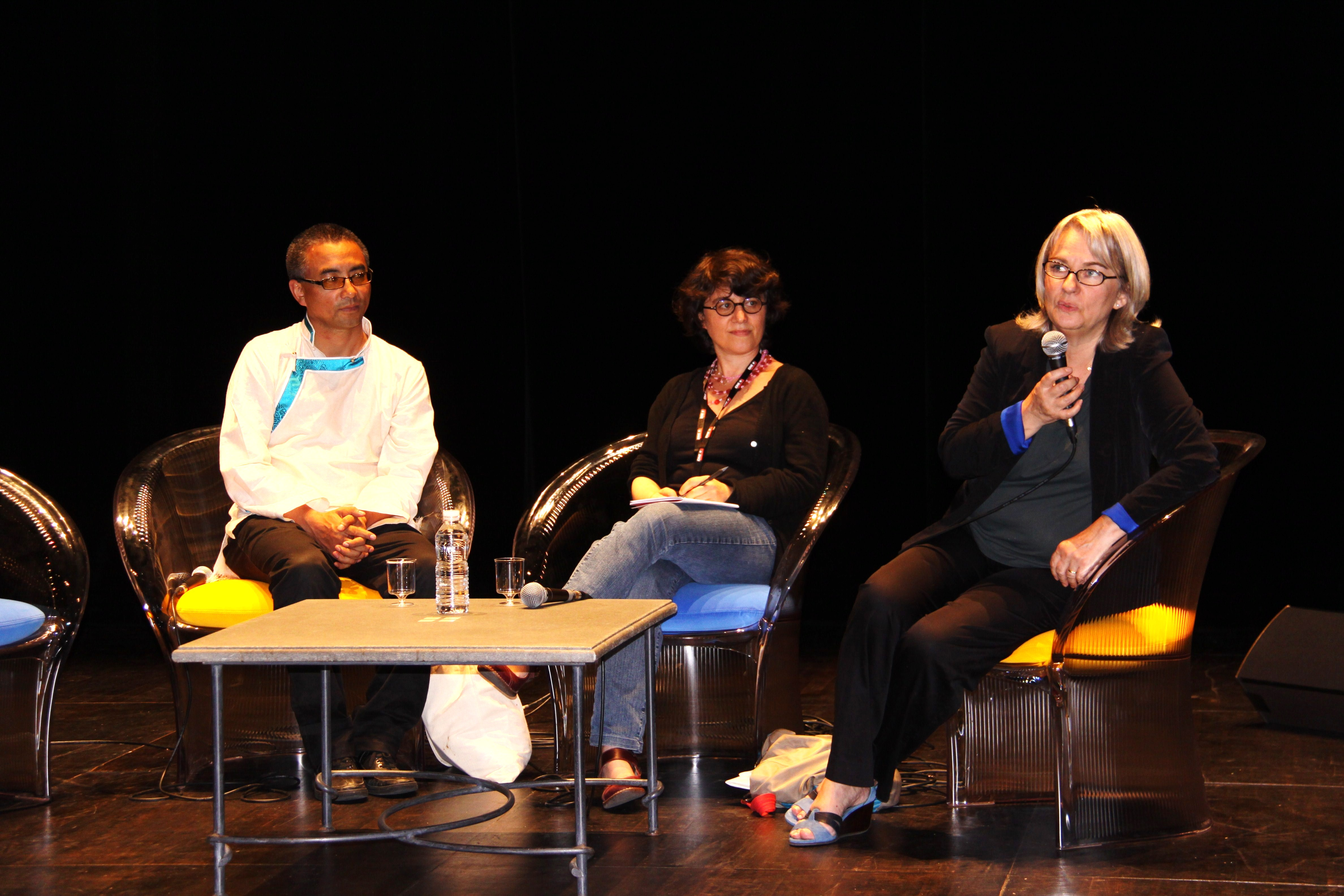 L' écrivain, scénariste et réalisateur tibétain Pema Tseden durant les Rencontres avec les réalisateurs au théatre Verdière de la Coursive (jeudi 5 juillet 2012 à 16h15) lors du Festival International du Film de La Rochelle 2012. De gauche à droite, Pema Tseden, Françoise Robin (interprète) et Prune Engler (déléguée générale du Festival). La Rochelle, Charente Maritime, France.